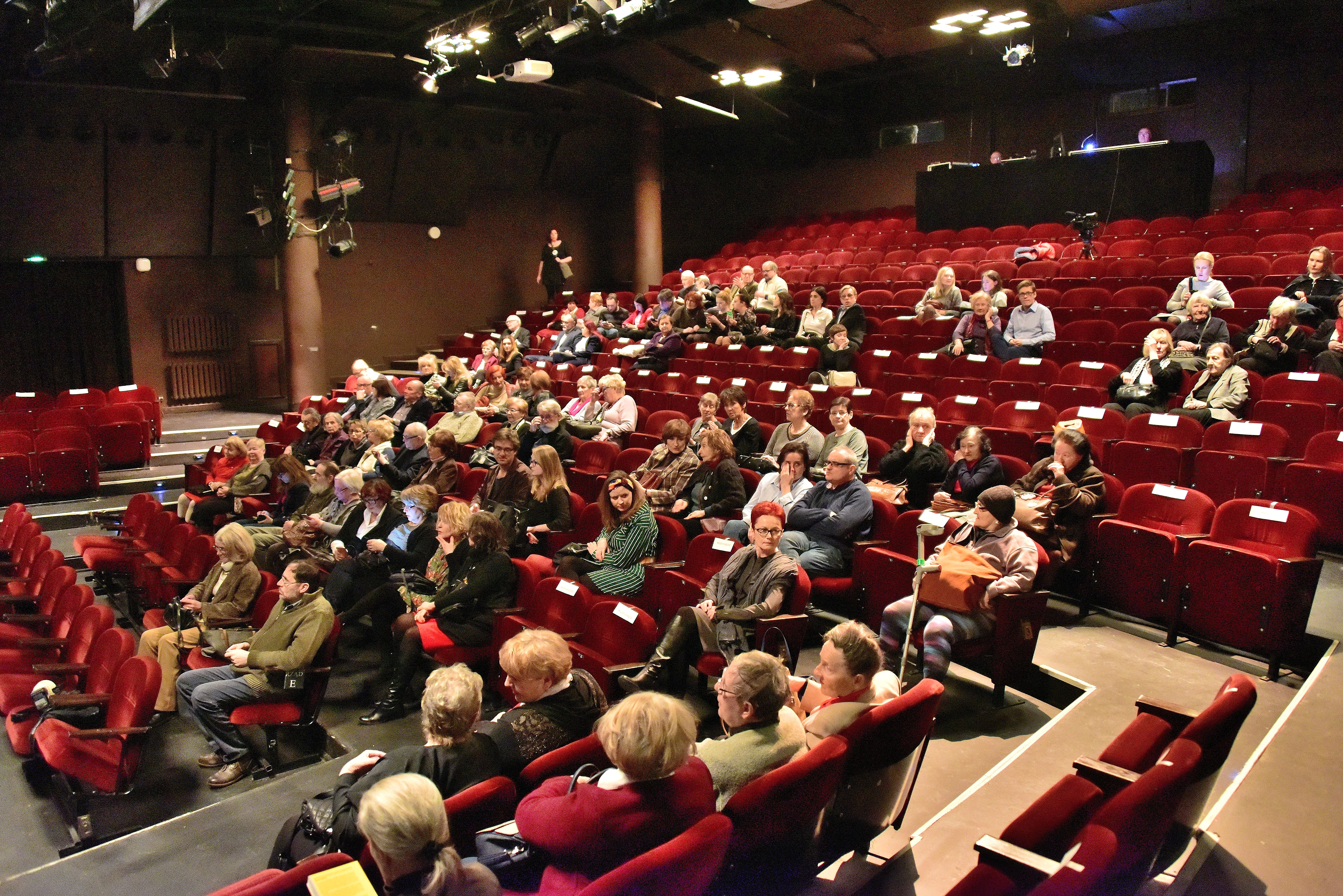 Teatr Dramatyczny m. st. Warszawy, Scena na Woli im. Tadeusza Łomnickiego. Uroczystość urodzin Ryszarda Kapuścińskiego i wręczenia Nagrody Translatorskiej dla tłumaczy Ryszarda Kapuścińskiego za całokształt twórczości